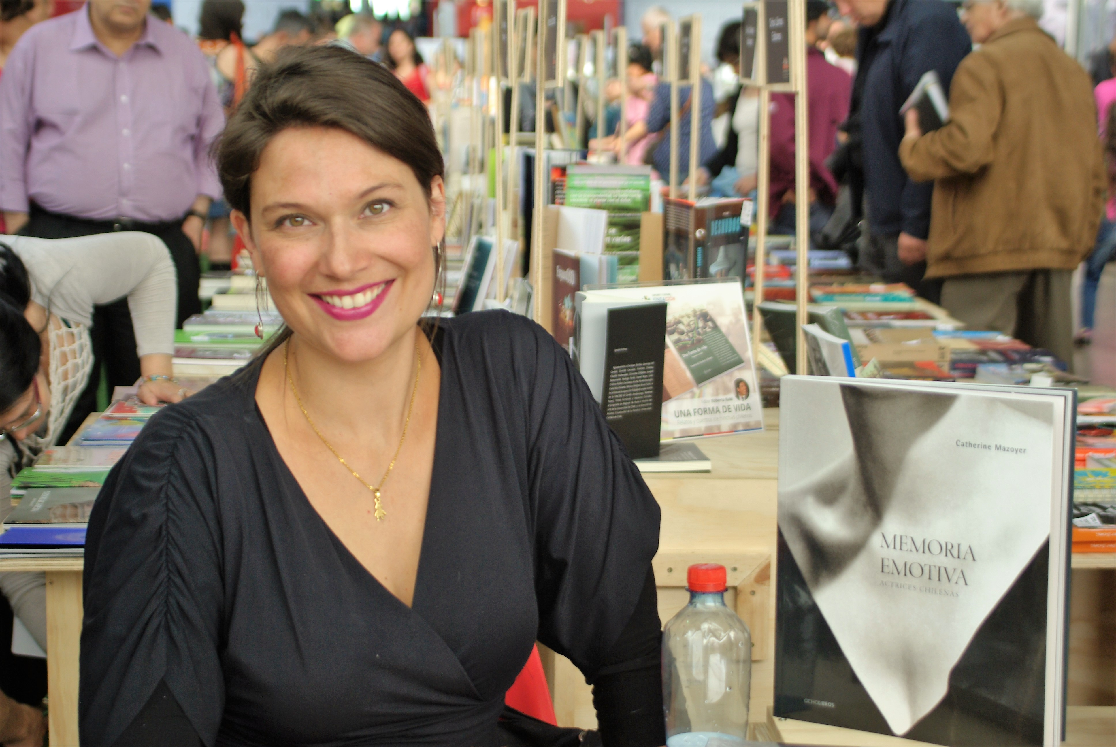 La actriz chilena Catherine Mazoyer en la Feria Internacional del Libro de Santiago 2016